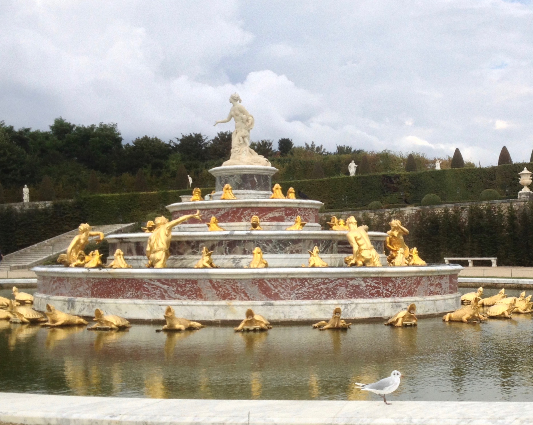 le Bassin de Latone au jardin du Château de Versailles après la restauration